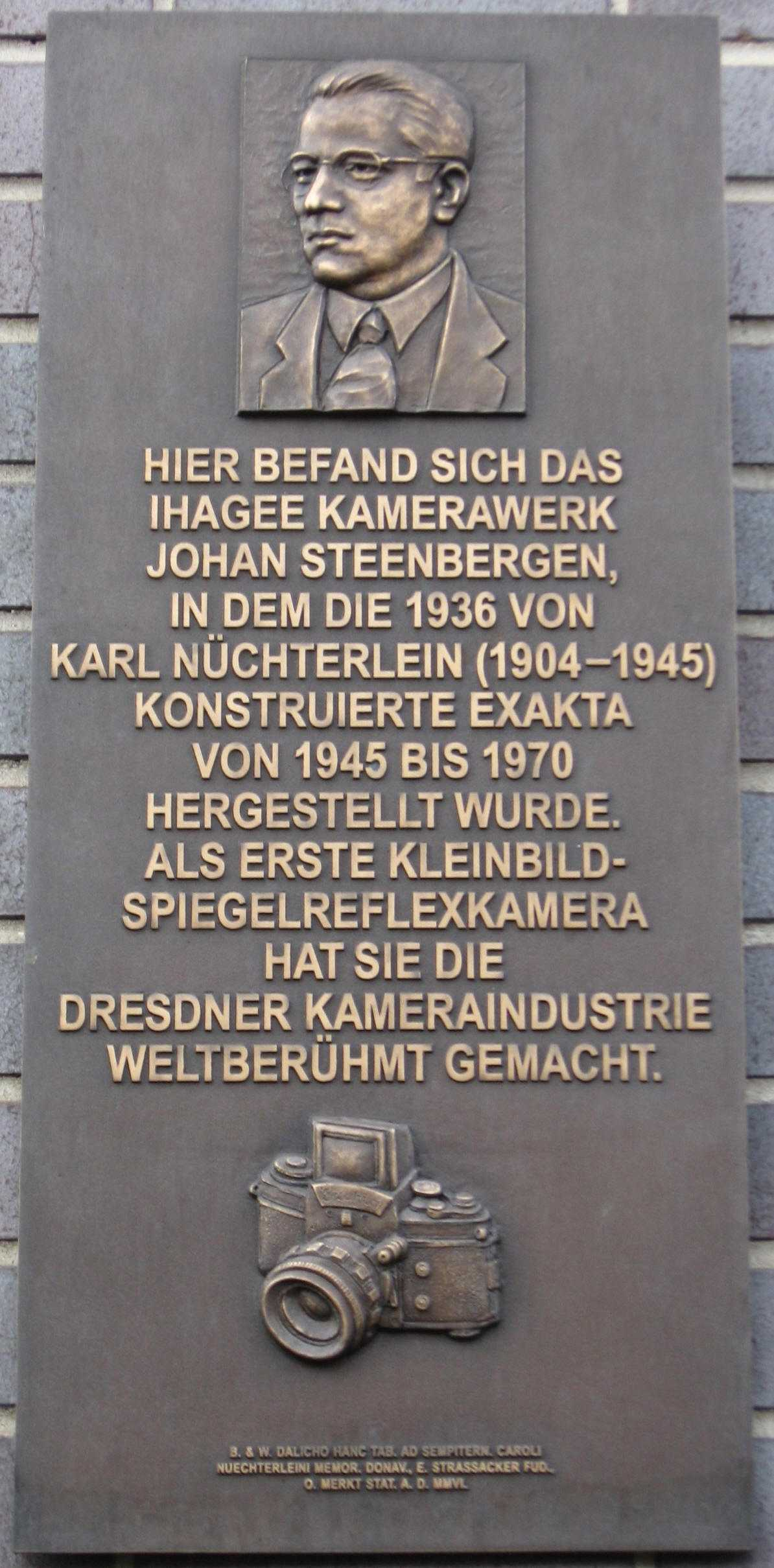 Gedenktafel für Karl Nüchterlein. Abgebildet: Kopfportät von ihm und eine Prägung der Exakta-Kamera. Ort: D-01307 Dresden, Blasewitzer Str. 41/43. Transcript: "Hier befand sich das Ihagee Kamerawerk Johan Steenbergen, in dem die 1936 von Karl Nüchterlein (1904-1945) konstruierte Exakta von 1945 bis 1970 hergestellt wurde. Als erste Kleinbildkamera hat sie die Dresdner Kameraindustrie weltberühmt gemacht. B. & W. Dalicho Hanc Tab. ad Sempitern. Caroli Nuechterlein Memor. Donav., E. Strassacker Fud., O. Merkt Stat. A. D. MMVI."